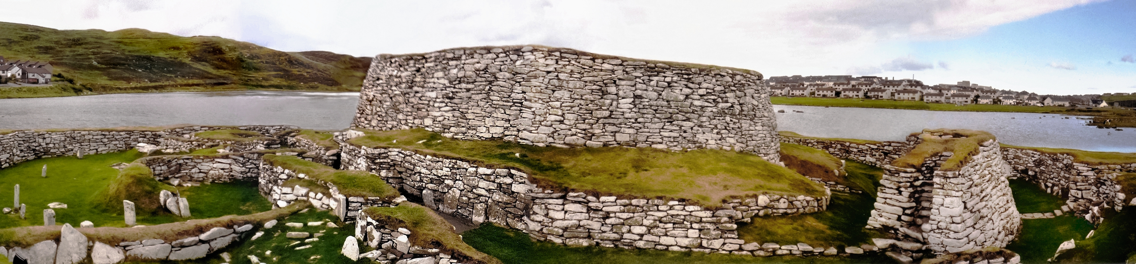 Clickimin Broch. Original uploader: Dem Zwickelbert sei Frau Derivative work of on the German Wikipedia. Retouched by Frank Schulenburg.